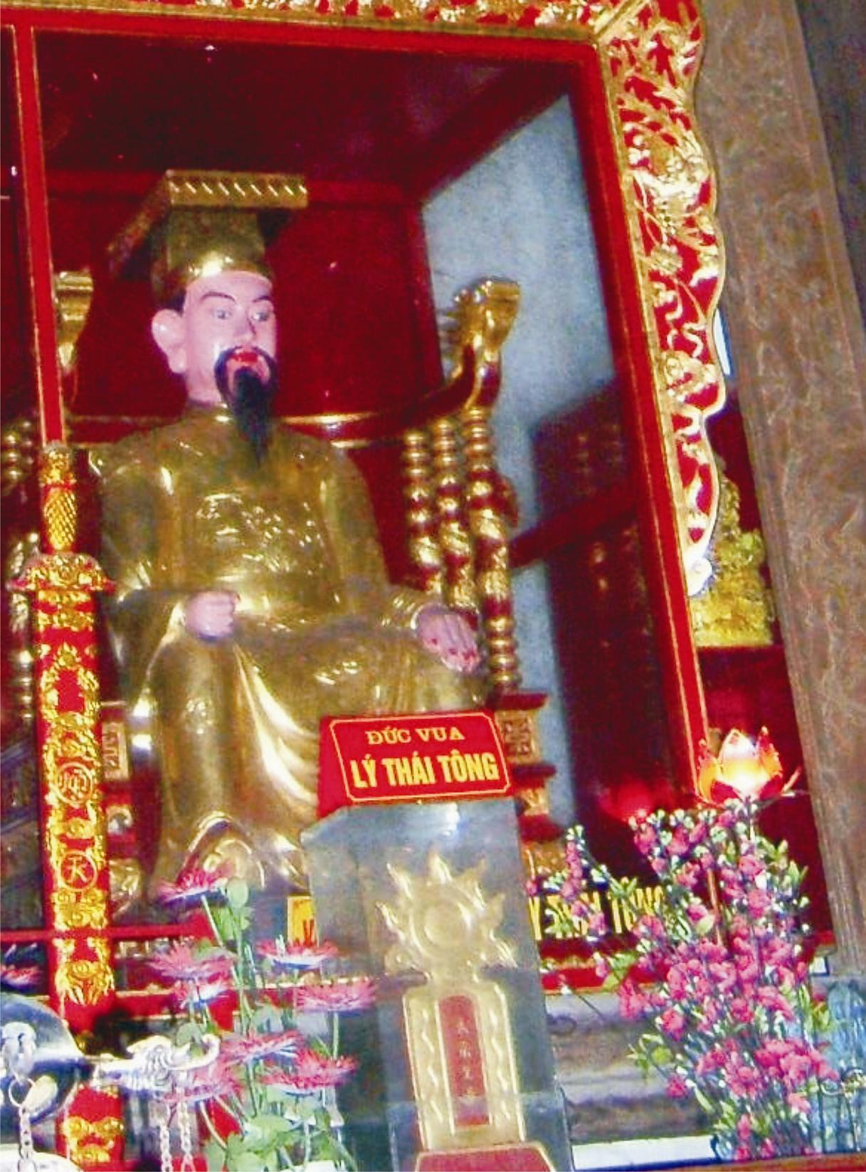 Hình Lý Thái Tông, trích từ hình Image:Lienhoabatdiep.JPG của Khương Việt Hà, chụp hình tượng tại đền Lý Bát Đế - this picture is taken from status at Ly Bat De Shrine, Vietnam